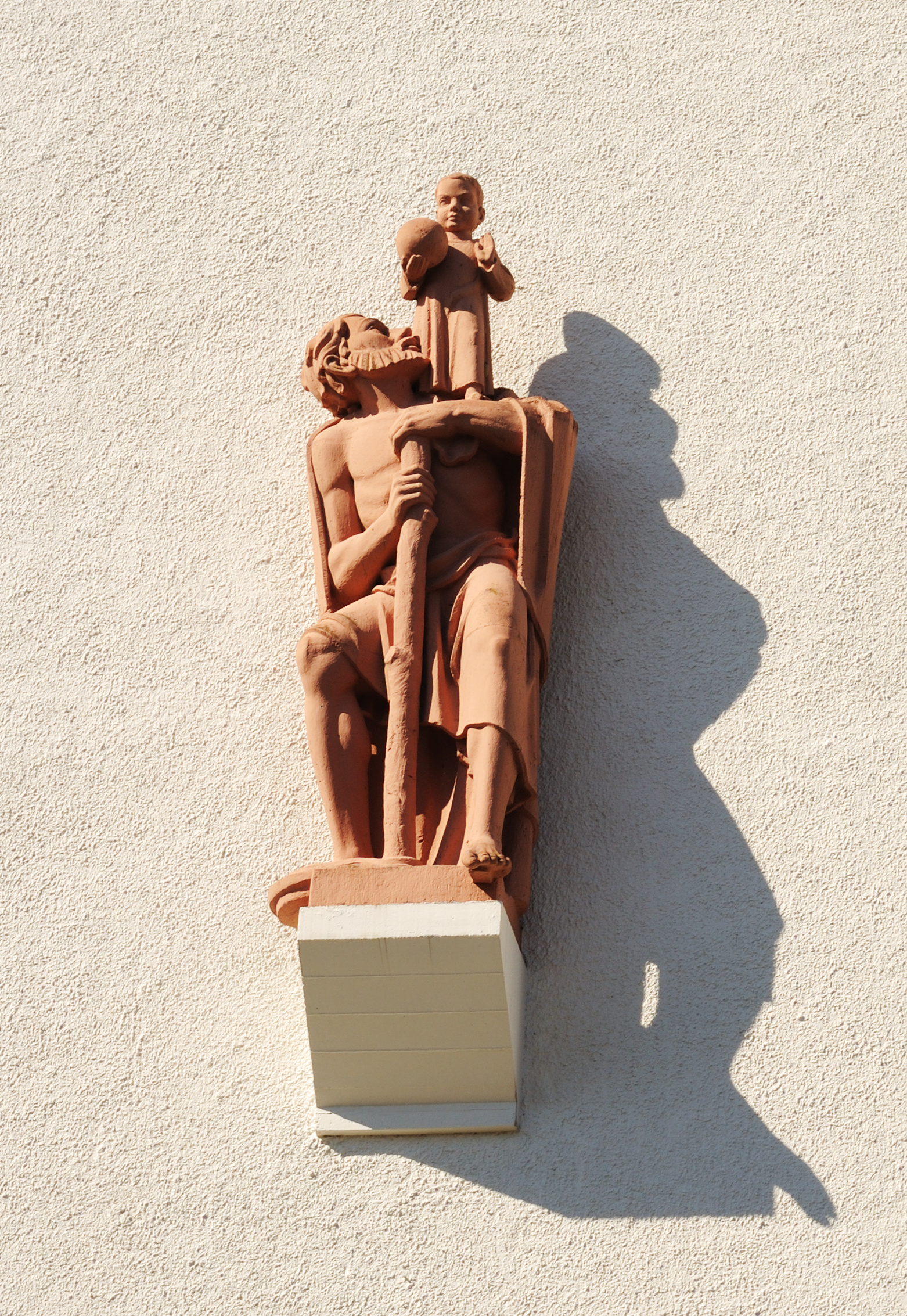 Rheinfelden-Nollingen: St. Felix und Regula, Josefsfigur über dem Eingangsportal